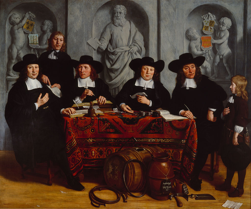 schilderij; ambachten en beroepen; kleinhandel, horeca, kantooractiviteiten; heraldiek; heraldiek; heraldiek; heraldiek; Kuipers- en Wijnverlatersgilde; Boonen, Dirck; Does Adriaansz., Willem van der; Loenen, Cornelis van; Westrenen, Jan Huybertse van; portret; groepsportret; regentenstuk; sculptuur; fust; gereedschap; Westreenen, Jan van; Boonen, Dirck; Loenen, Cornelis van; Does, Willem van der